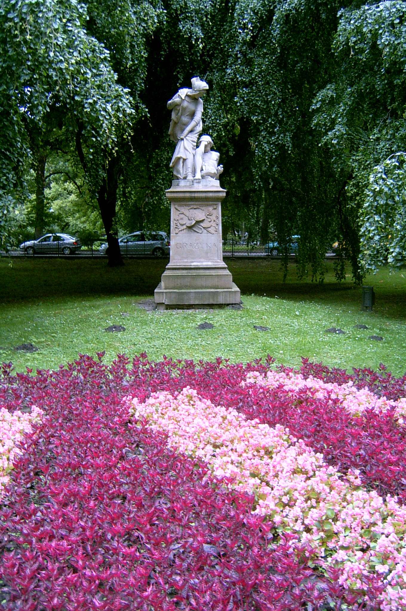 Kraków, Poland